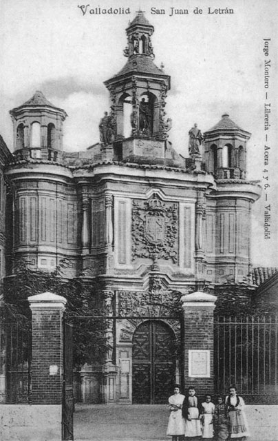 Iglesia de San Juan de Letrán - Valladolid - Colección Valladolid, postales para el Recuerdo, editada por el Diario El Mundo de Valladolid. Jorge Montero - Librería - Acera 4 y 6. Valladolid - San Juan de Letrán. - Fotografía. Papel 90 x 140 B/N